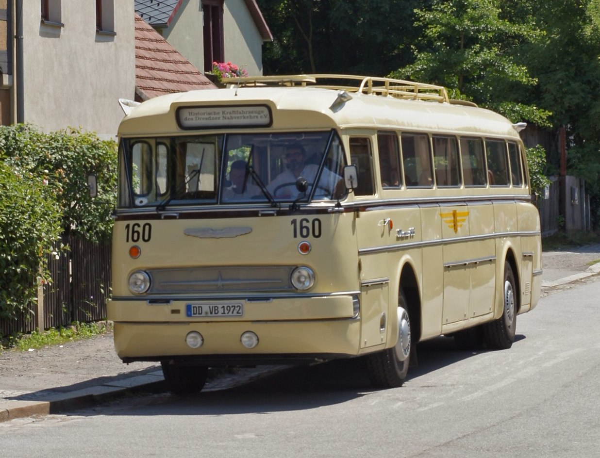 Friedrich-Wieck-Straße, Loschwitz